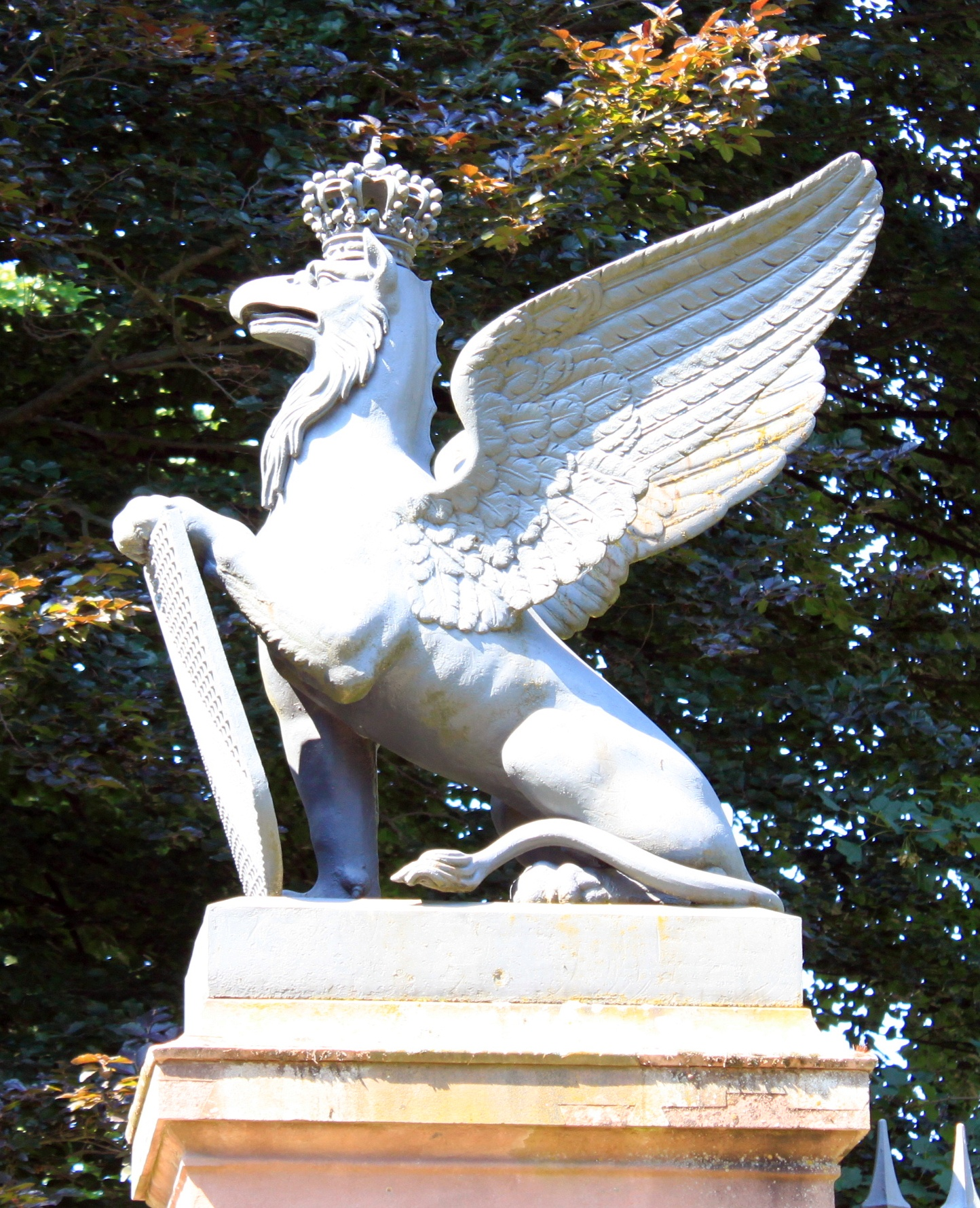 Greif auf dem ehemaligen Mühlburger Tor, am heutigen Standort im Karlsruher Schlossgarten